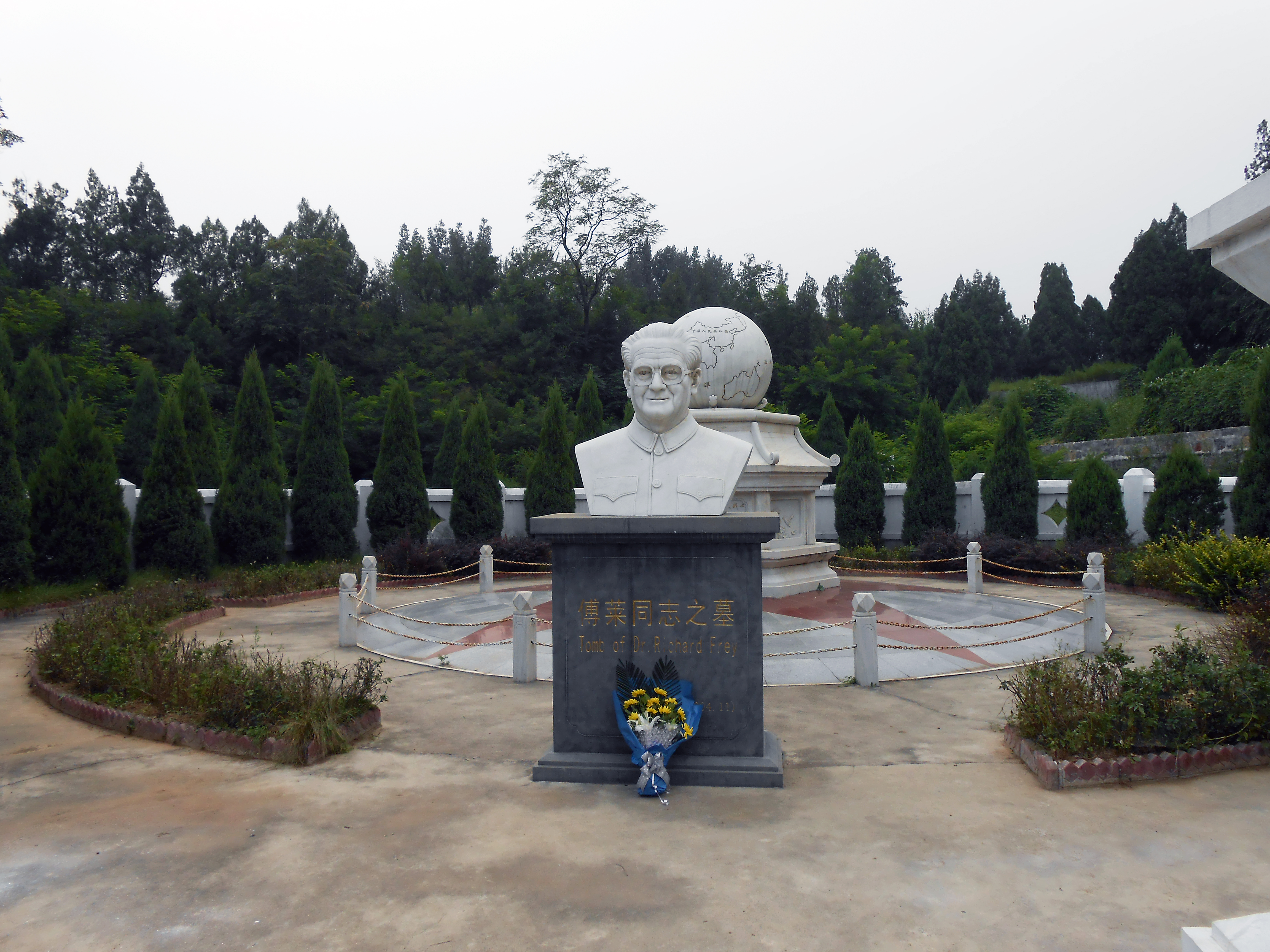 傅莱纪念碑 - 唐县晋察冀烈士陵园